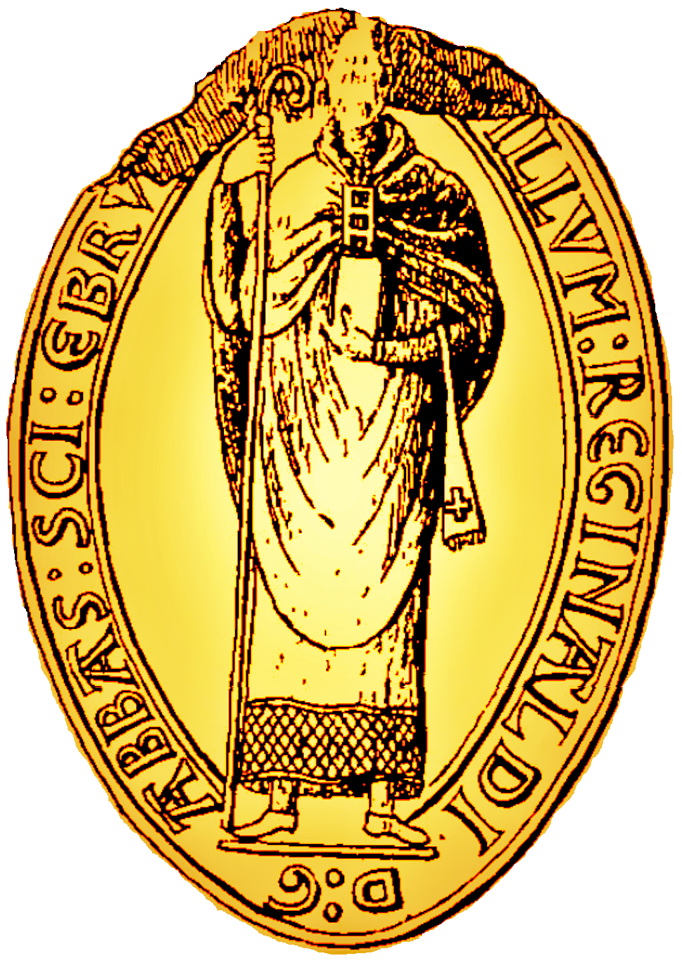 Abbaye de Saint-Evroult, Orne, Sceau de l'abbé Reginad